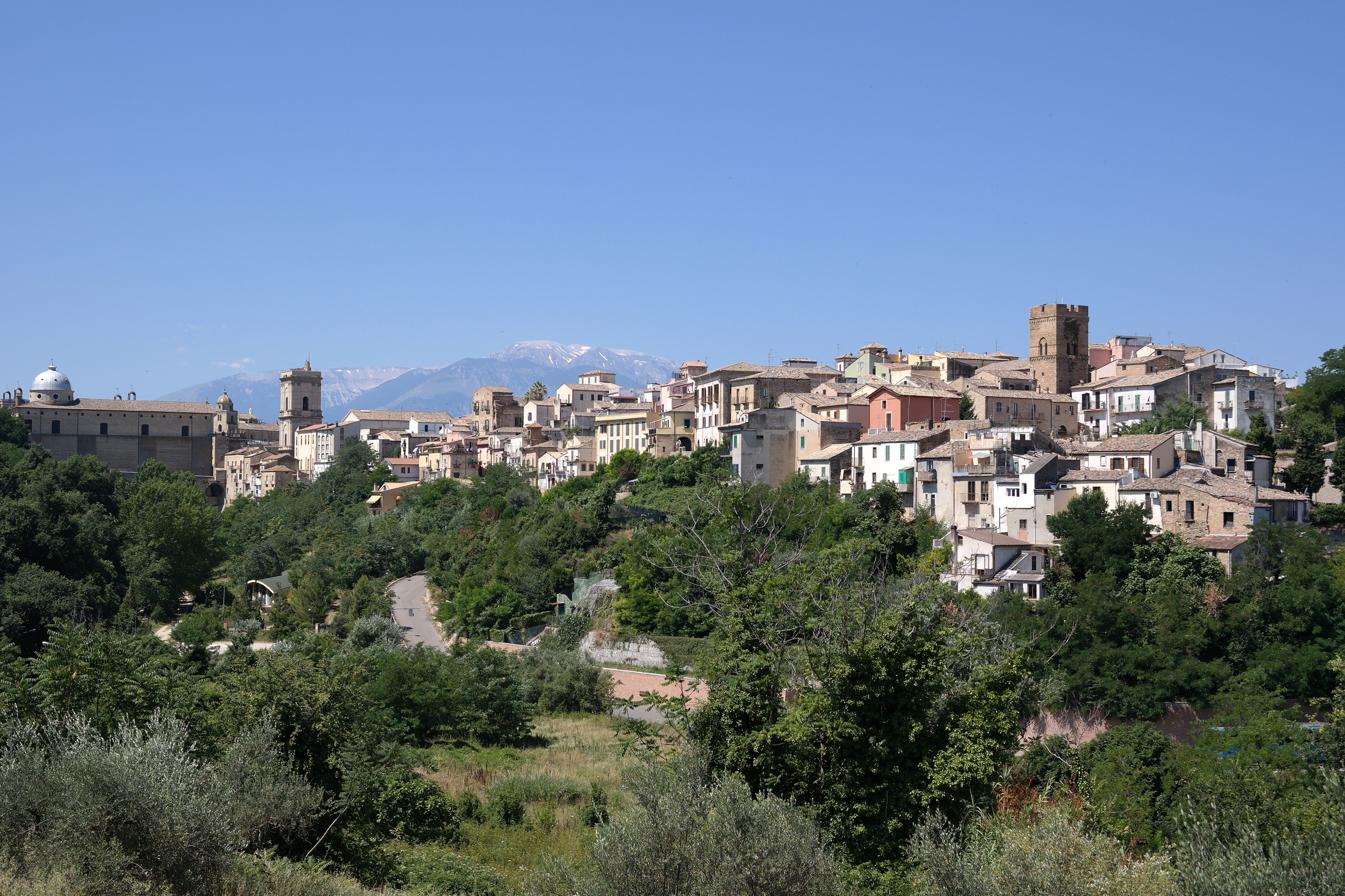 Panorama del centro storico di Lanciano